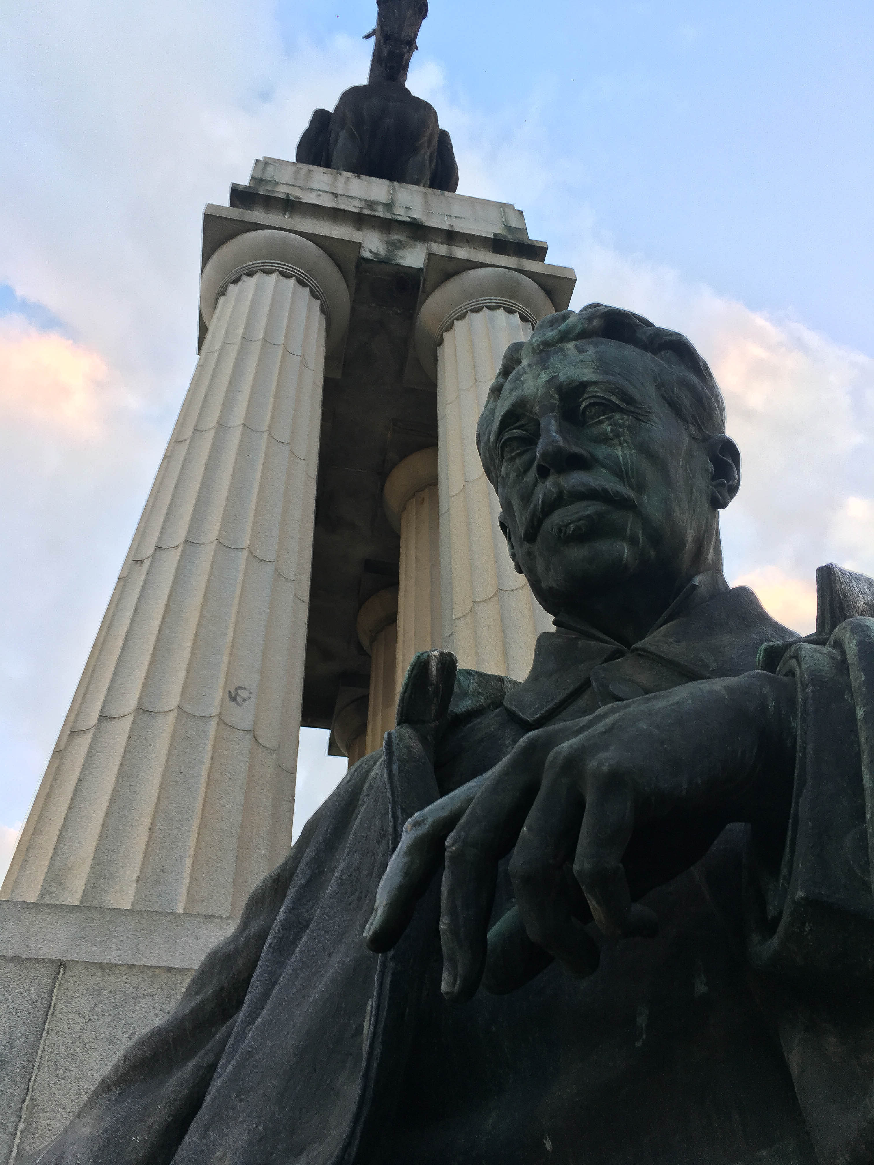 Face oeste do monumento. Praça Ramos de Azevedo. Butantã, São Paulo-Brasil.